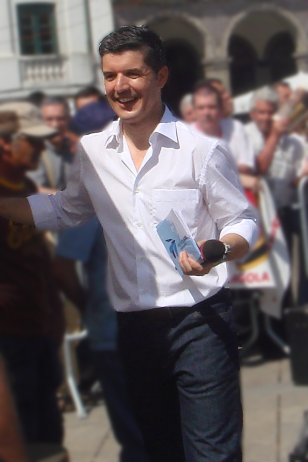 O actor João Baião a fazer a apresentação de um programa de televisão na Praça de República, em Braga.